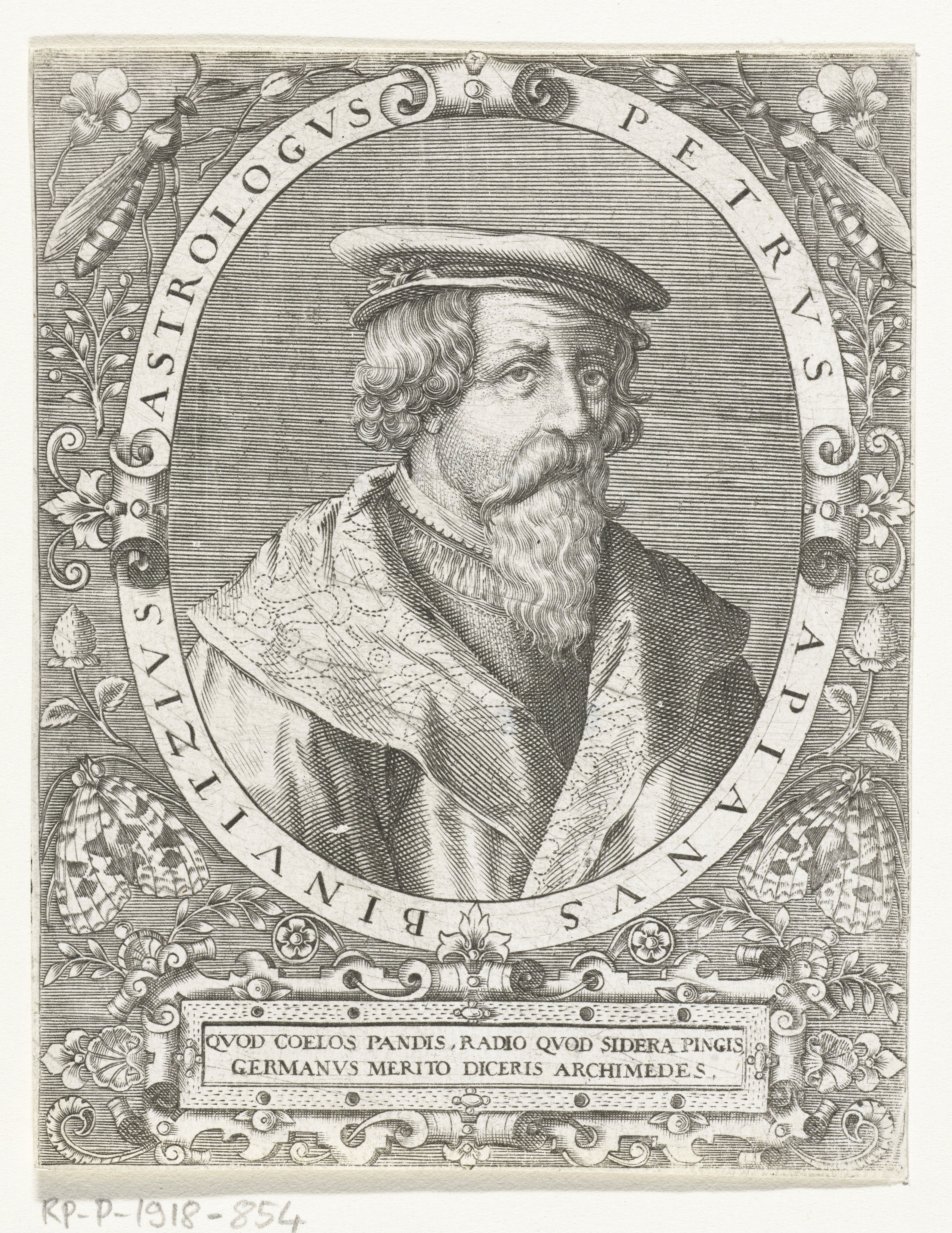 IdentificatieTitel(s): Portret van Petrus ApianusPetrus Apianus Binutzius (titel op object)Objecttype: prent boekillustratie Objectnummer: RP-P-1918-854Catalogusreferentie: Singer 7500Opschriften / Merken: verzamelaarsmerk, verso, gestempeld: Lugt 2233Omschrijving: Portret van de wiskundige en cartograaf Petrus Apianus, in ovaal met randschrift. In een sierlijst met bloemen en insecten met een cartouche met een Latijns vers onder het portret.VervaardigingVervaardiger: prentmaker: Cornelis Galle (I)naar ontwerp van: Jean Jacques Boissard (mogelijk)Plaats vervaardiging: onbekendDatering: ca. 1597 - ca. 1599Fysieke kenmerken: gravureMateriaal: papier Techniek: graveren (drukprocedé)Afmetingen: blad: h 140 mm × b 108 mmToelichtingGemaakt voor: J.J. Boissard, Icones virorum illustrium doctrina &c eruditione praestanti um contines. Frankfurt am Main: de Bry, 1597-1599.OnderwerpWie: Petrus ApianusVerwerving en rechtenVerwerving: aankoop 1905Copyright: Publiek domein